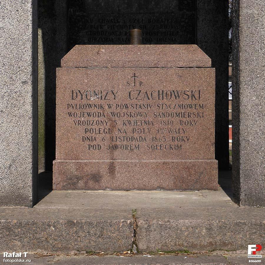 Sarkofag w którym przed wojną znajdowała się trumna z prochami Dionizego Czachowskiego.